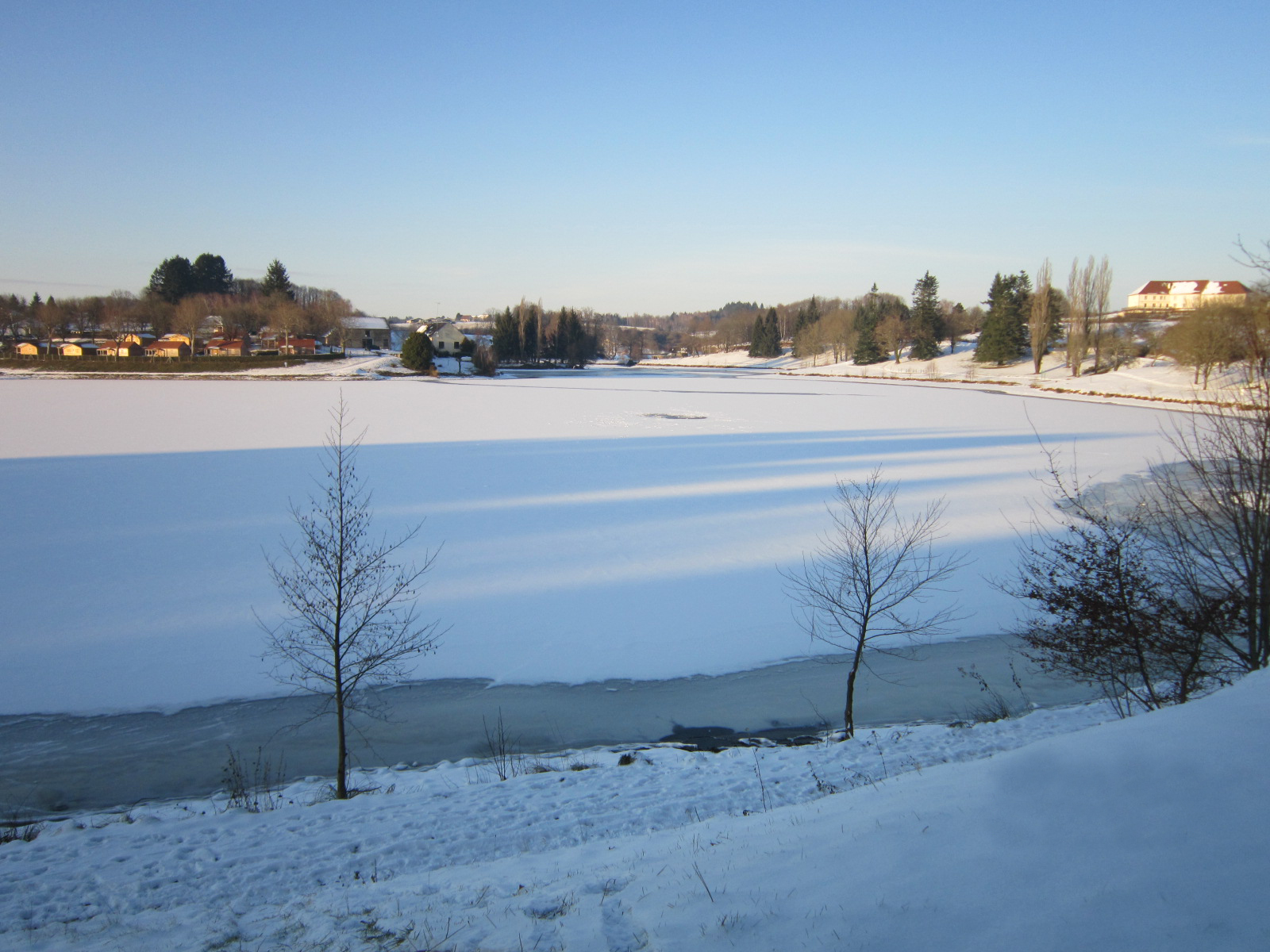 Vue enneigée sur le lac d'Arfeuille